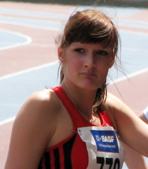 Jenny Elbe beim Olympia-Qualifikationswettkampf 2012 im Stadion der MTG Mannheim.